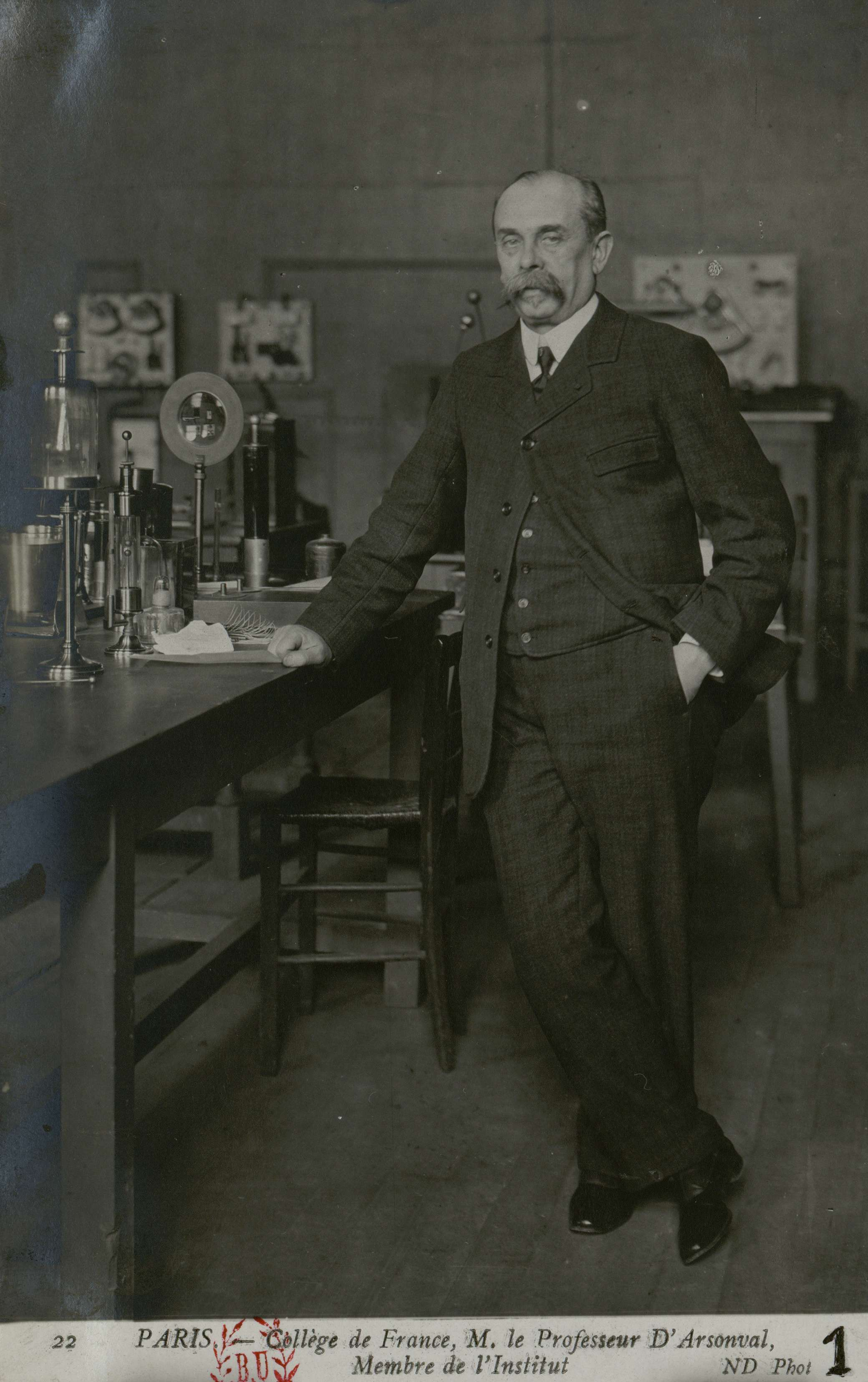 Carte postale